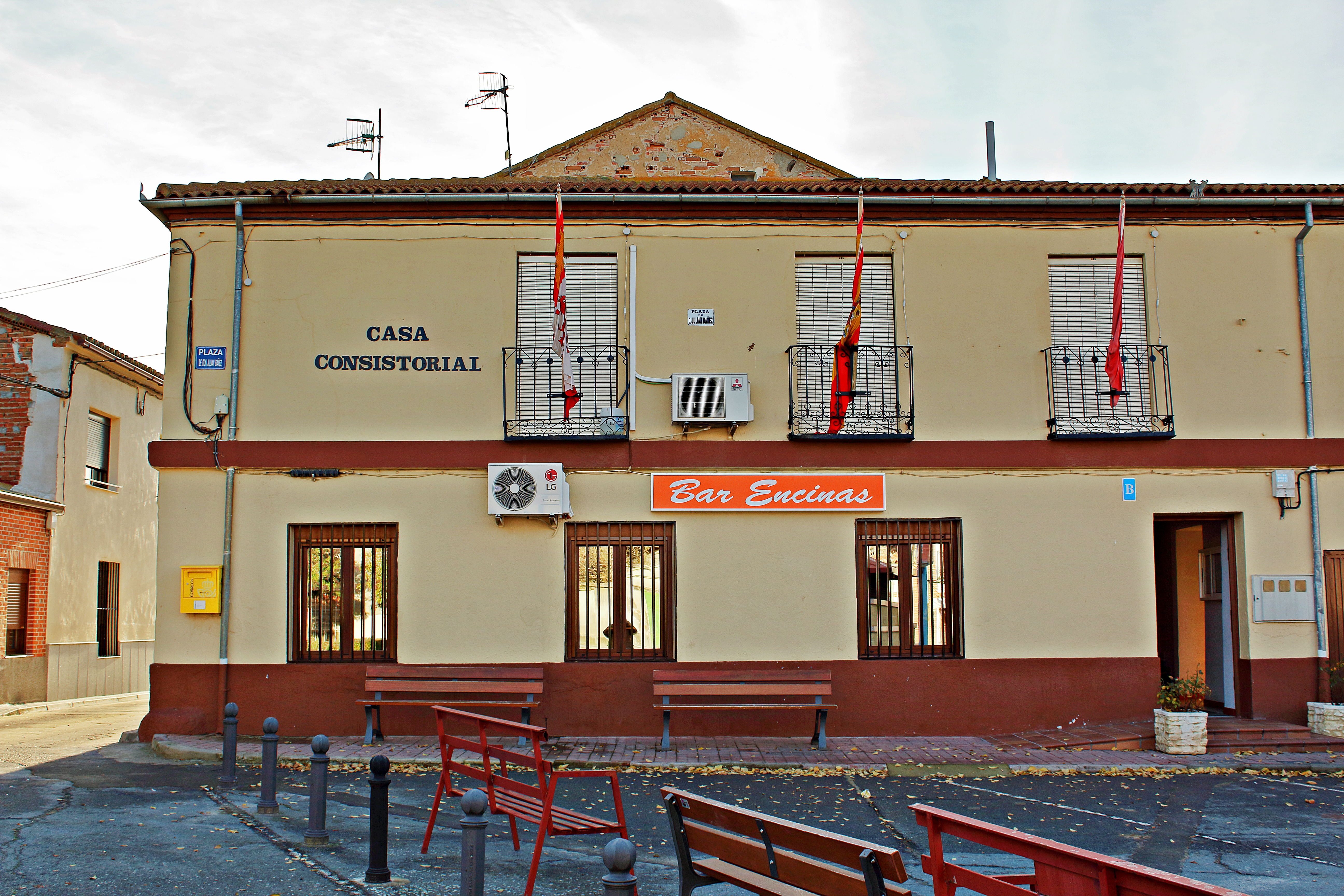 Bernuy-Zapardiel municipio de la comarca de La Morana en la provincia de Ávila